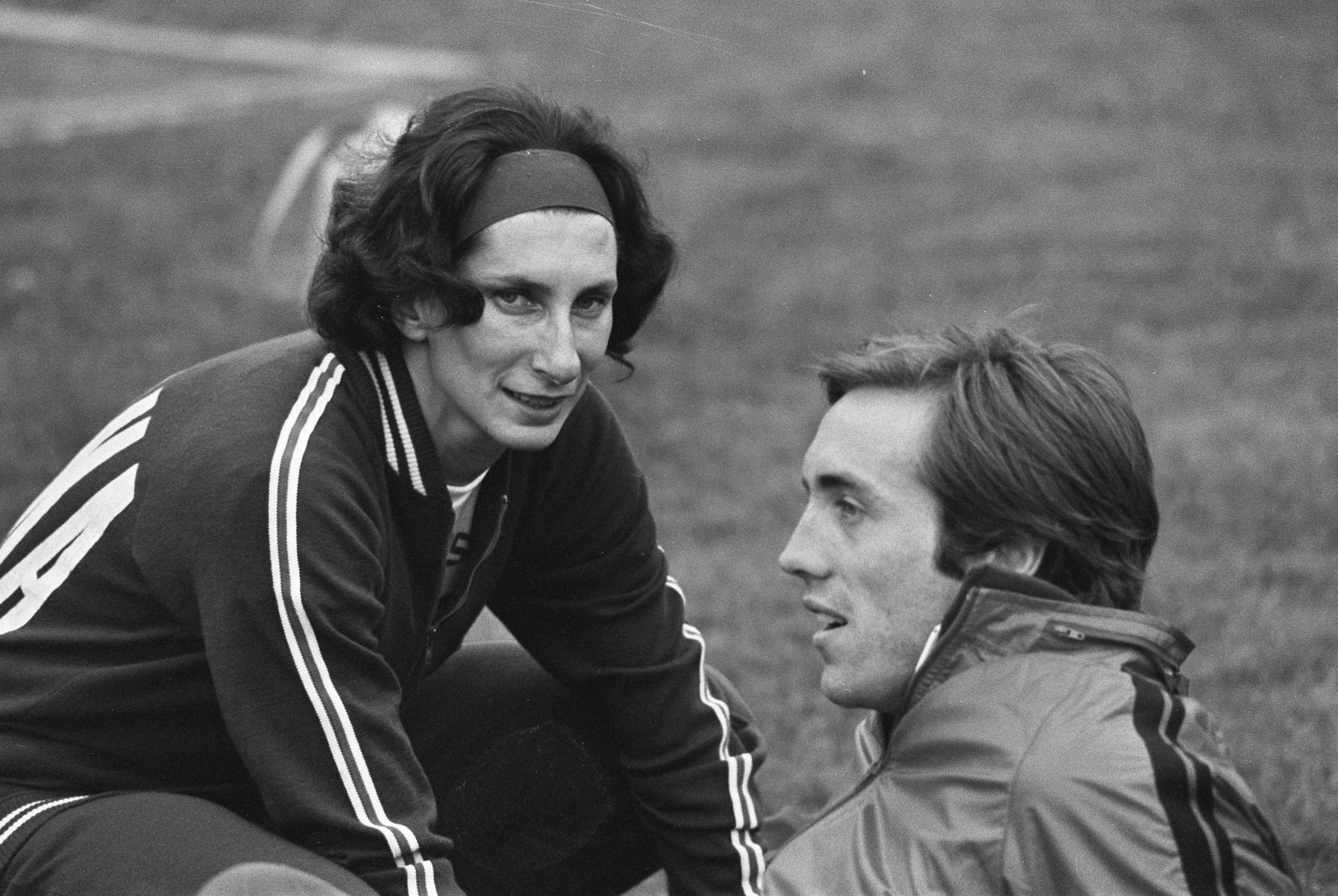 Internationale atletiekwedstrijden op Papendal in 1975. Poolse wereldrecordhoudster Irena Szewinska met landgenoot Buciarski